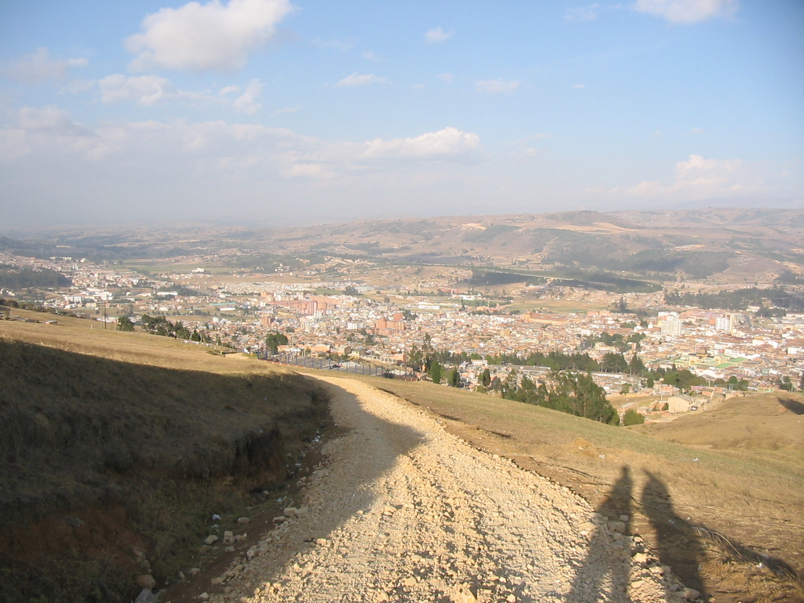 Vista de Tunja desde el Alto de San Lázaro